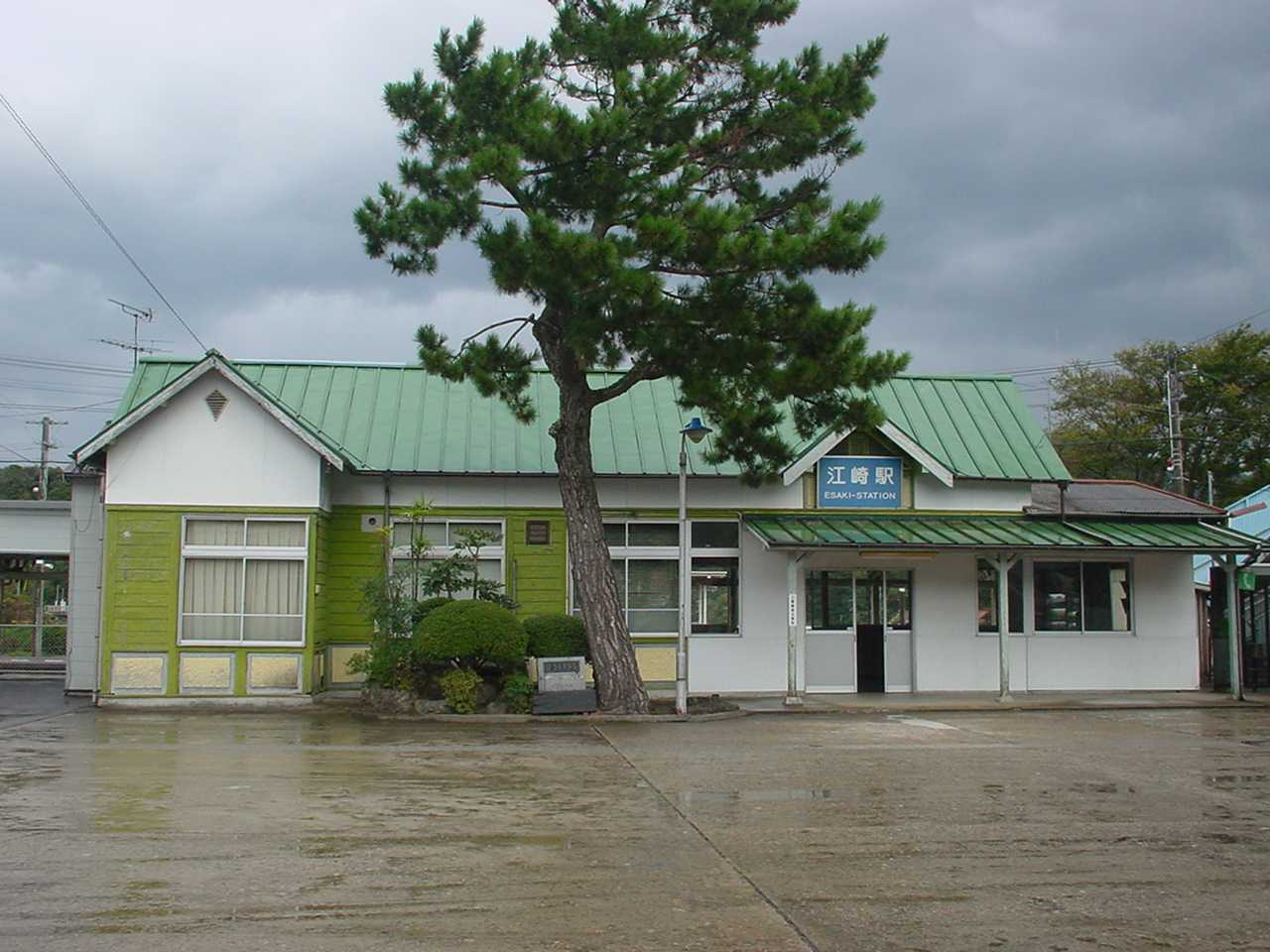 江崎駅（2005年10月22日投稿者が撮影）